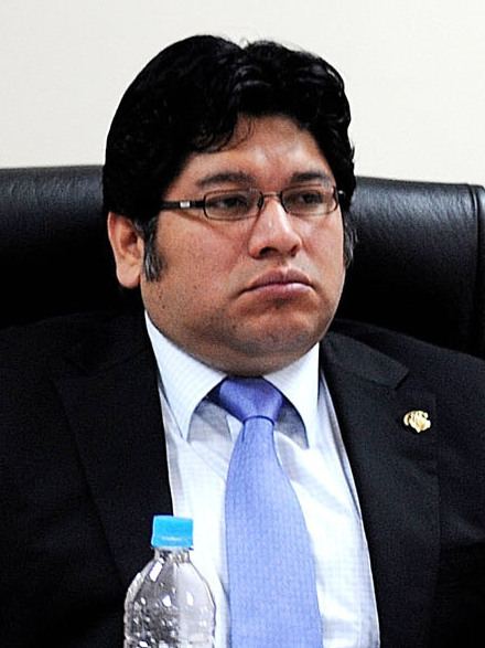 Sesión de la Comisión de Educación, presidida por el congresista Renán Espinoza Rosales.